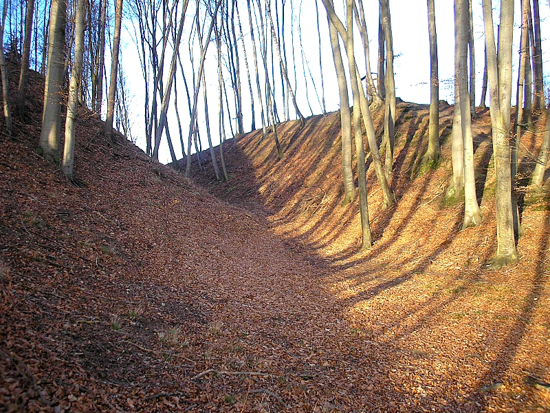 Burgstall Sand (Todtenweis, Landkreis Aichach-Friedberg, Bayerisch-Schwaben). Der östliche Grabenabschnitt. Eigene Aufnahme, Jan. 2008 / Former Sand castle (Todtenweis, Landkreis Aichach-Friedberg, Bavaria, Germany). The eastern moat. Own photo, Jan. 2008